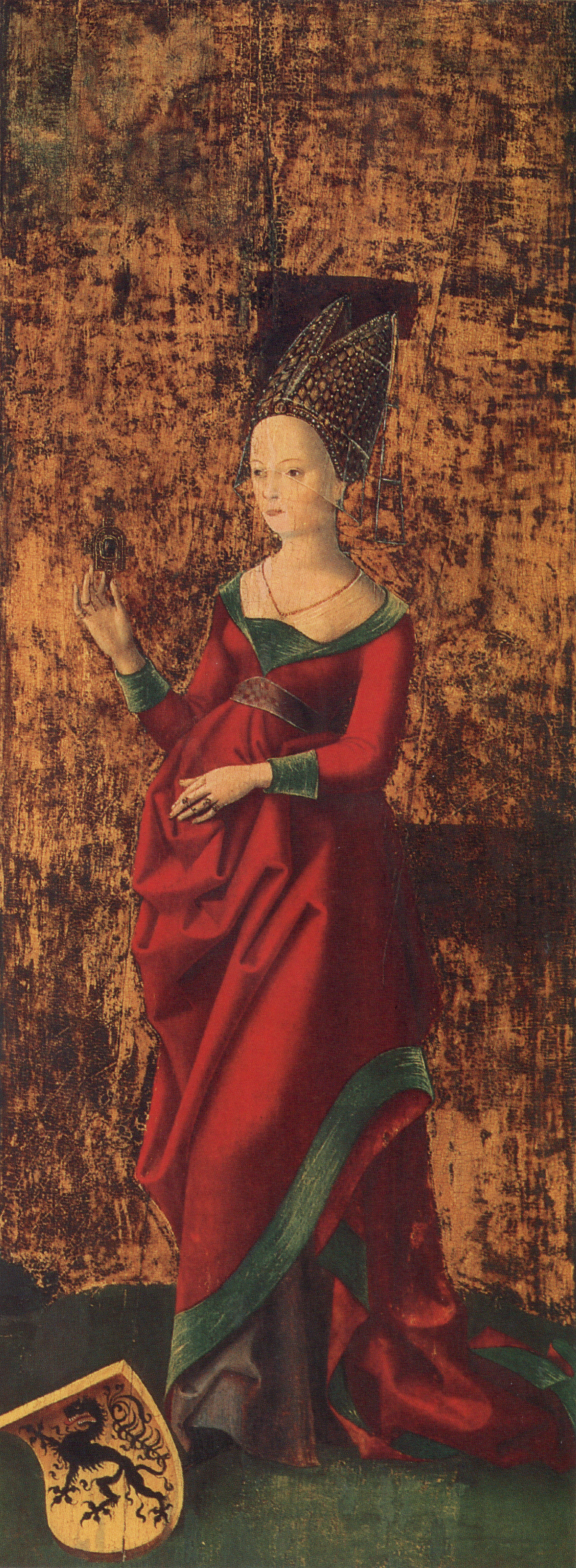 Weingartener Heilig-Blut-Tafel von 1489. Landesmuseum Württemberg, Stuttgart. Judith von Flandern (ehemals Außenseite des rechten Seitenflügels des Flügelaltars, heute abgespalten und als Tafebild gehängt)